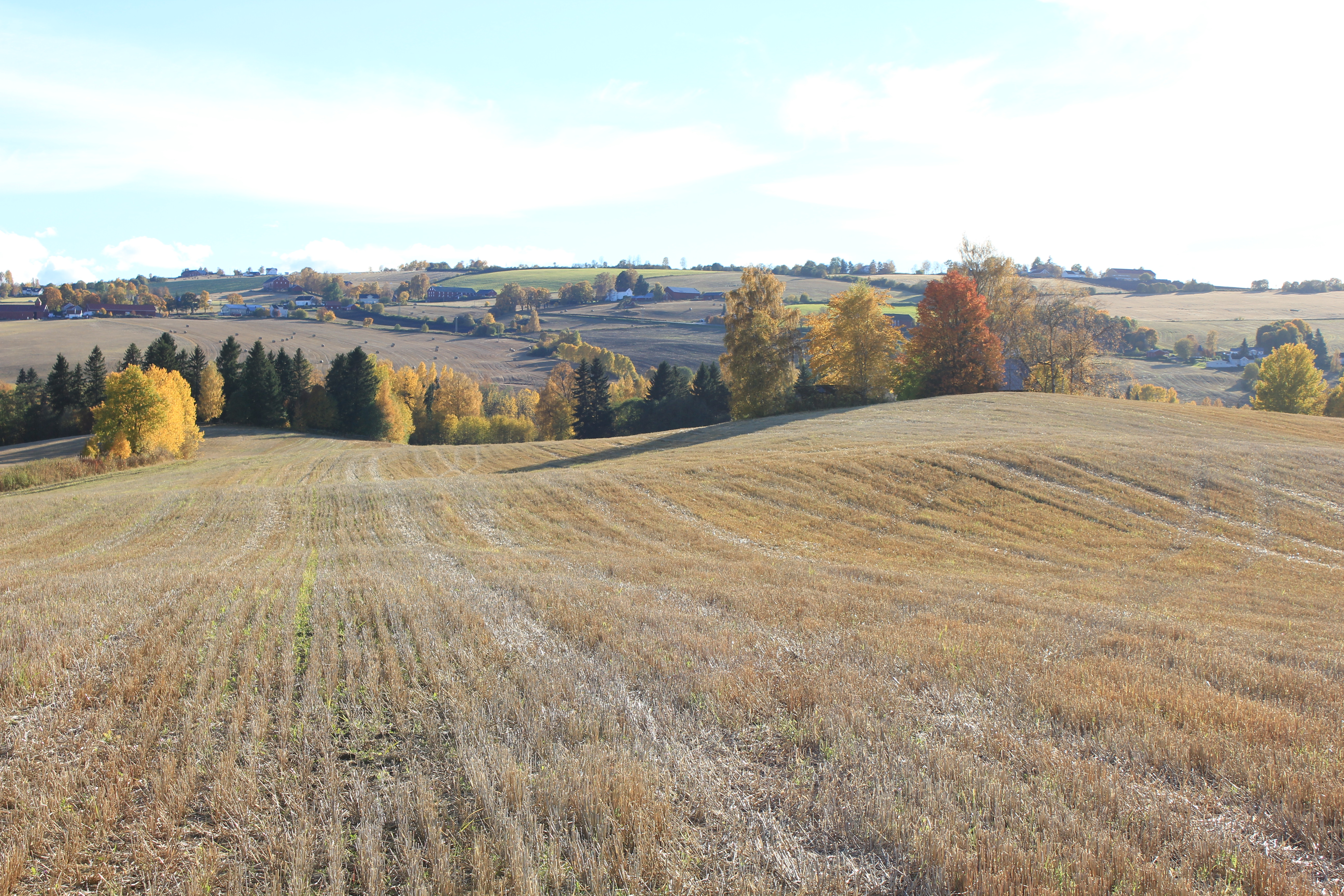 Utsyn mot Lensbygda, Østre Toten, Oppland. Norway.